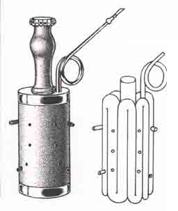 provient d'une planche ancienne